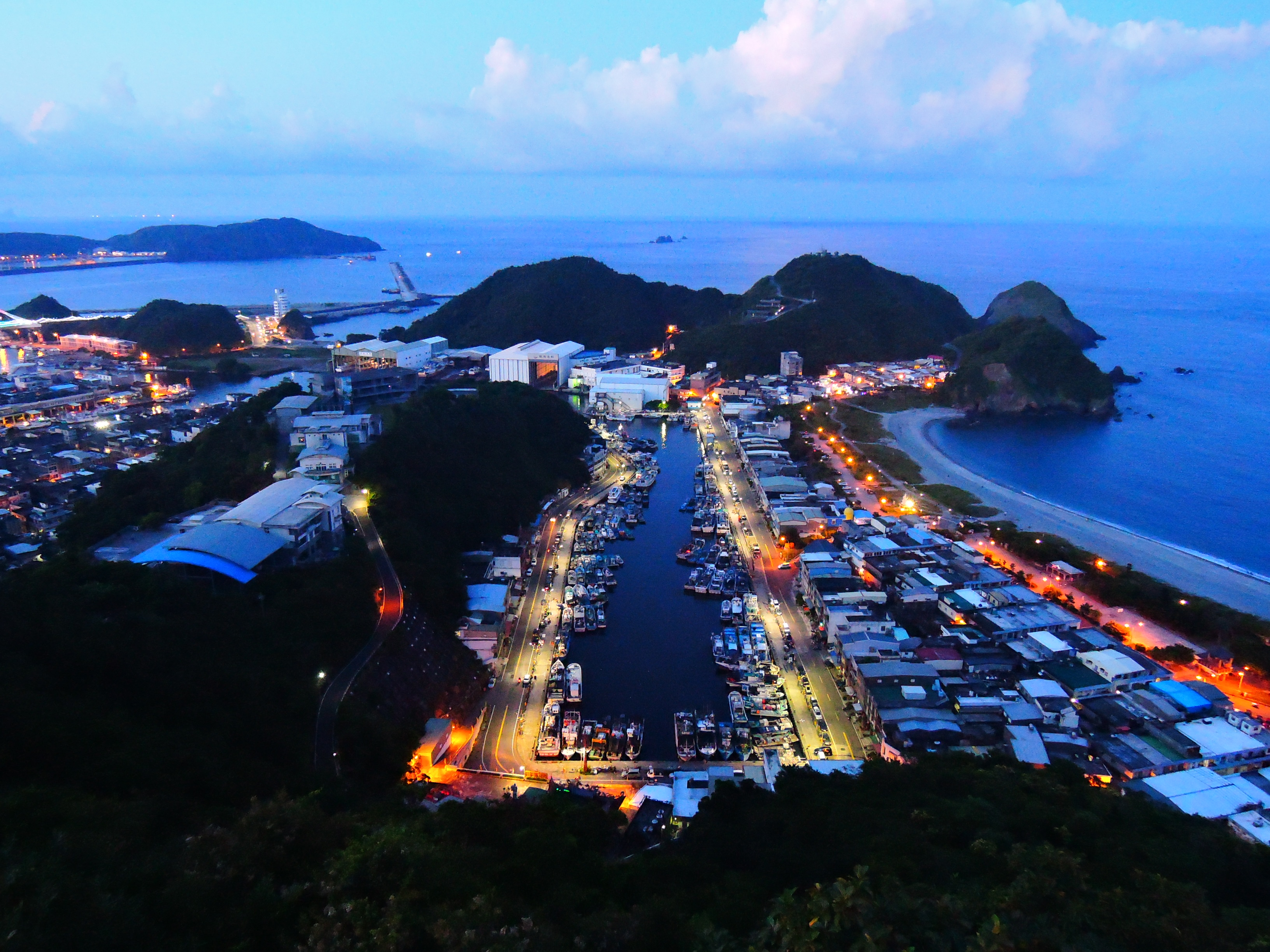 蘇澳鎮南方澳漁港